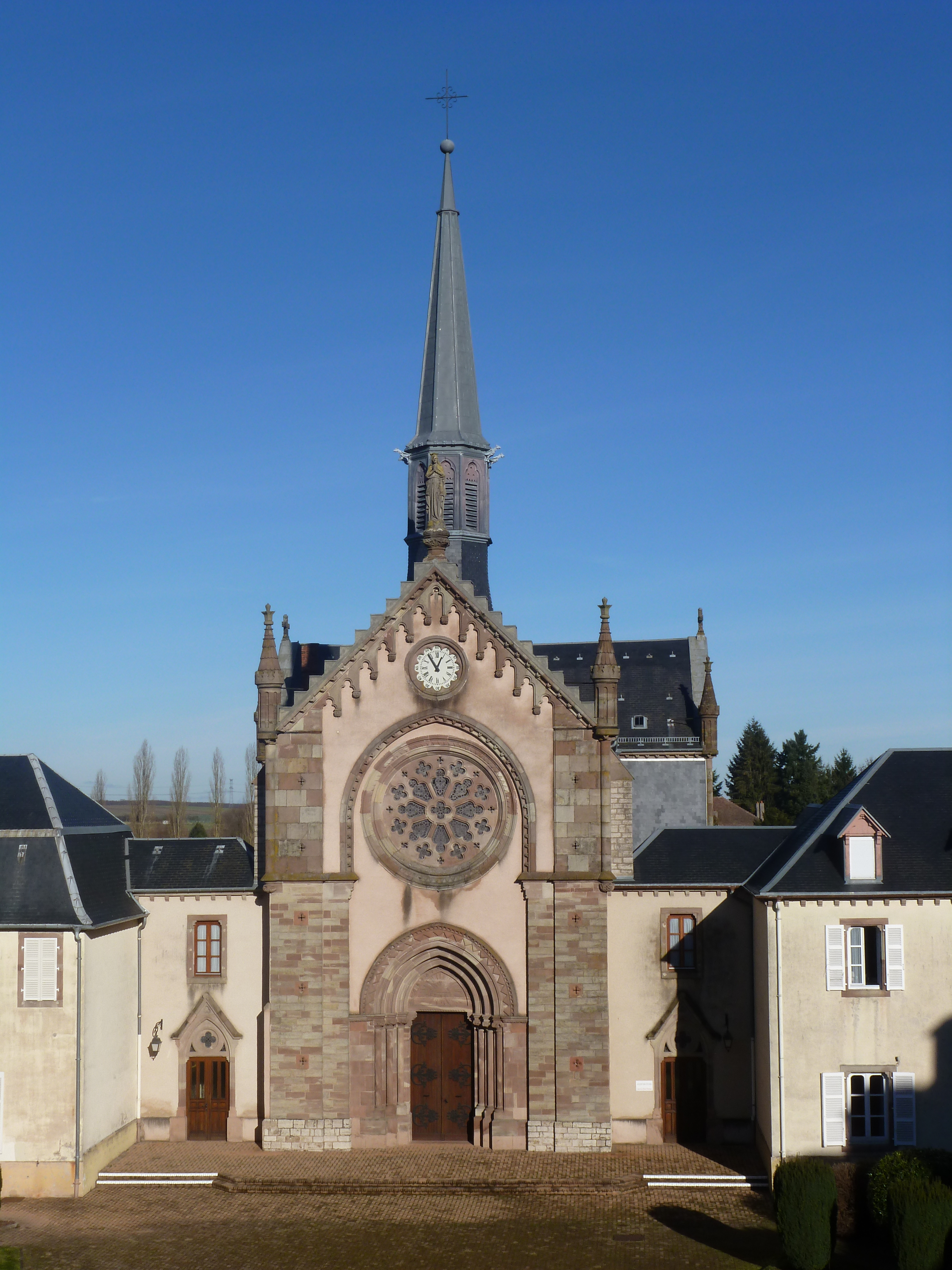 Vue du couvent des sœurs de la Divine Providence de Saint-Jean-de-Bassel.